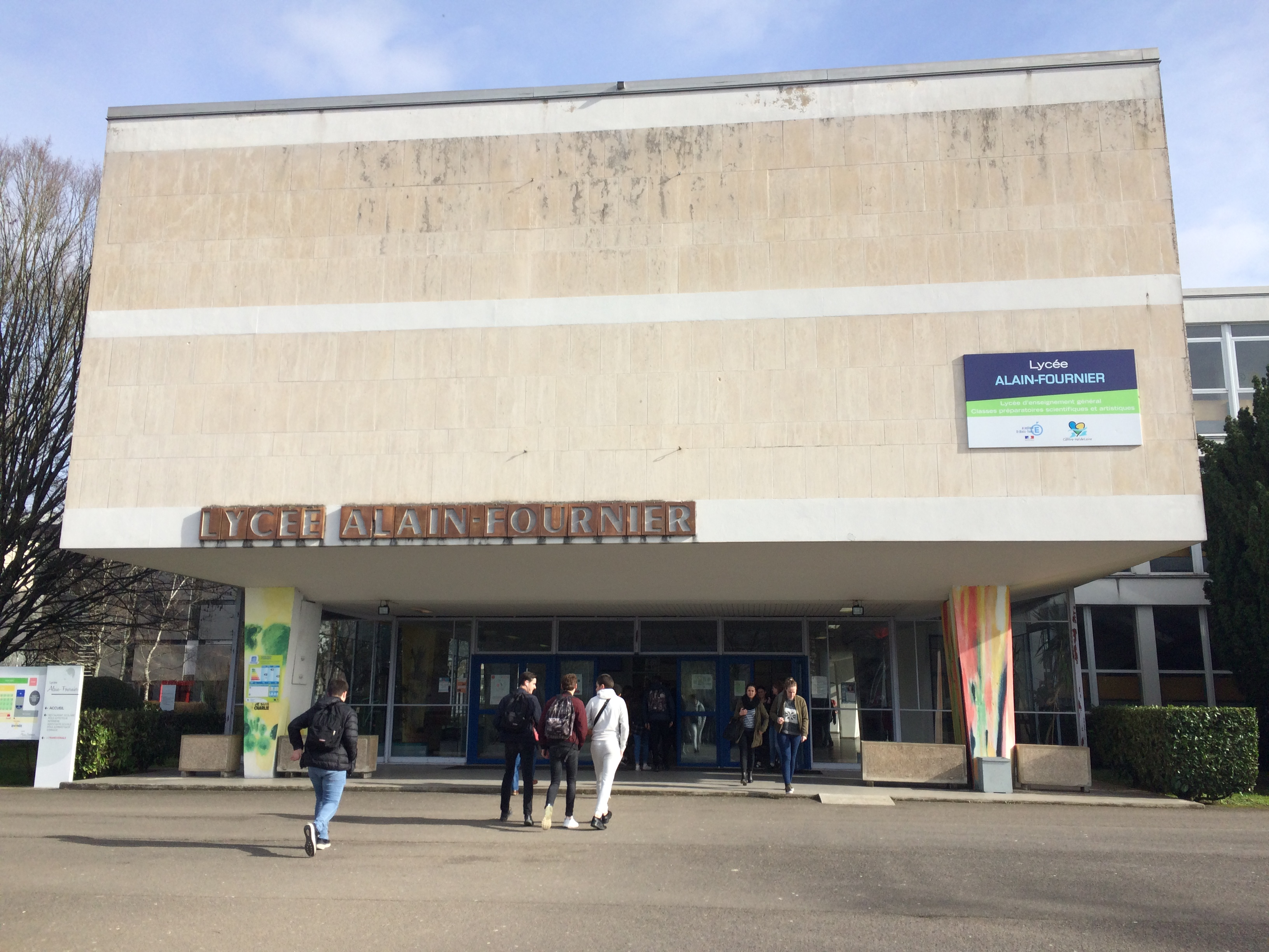 Entrée du lycée Alain-Fournier